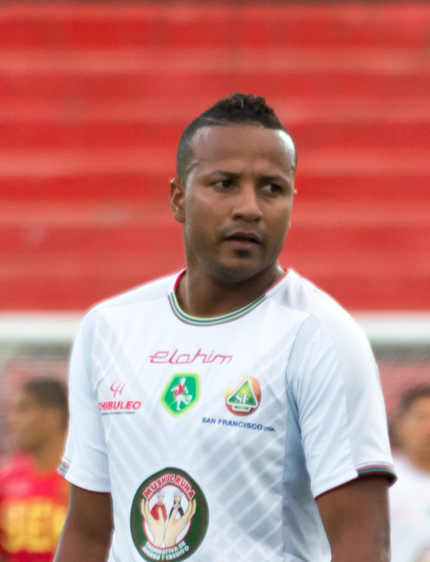 Álex George, Unión Española v Mushuc Runa, Estadio Santa Laura, Independencia, Santiago, Región Metropolitana, Chile.